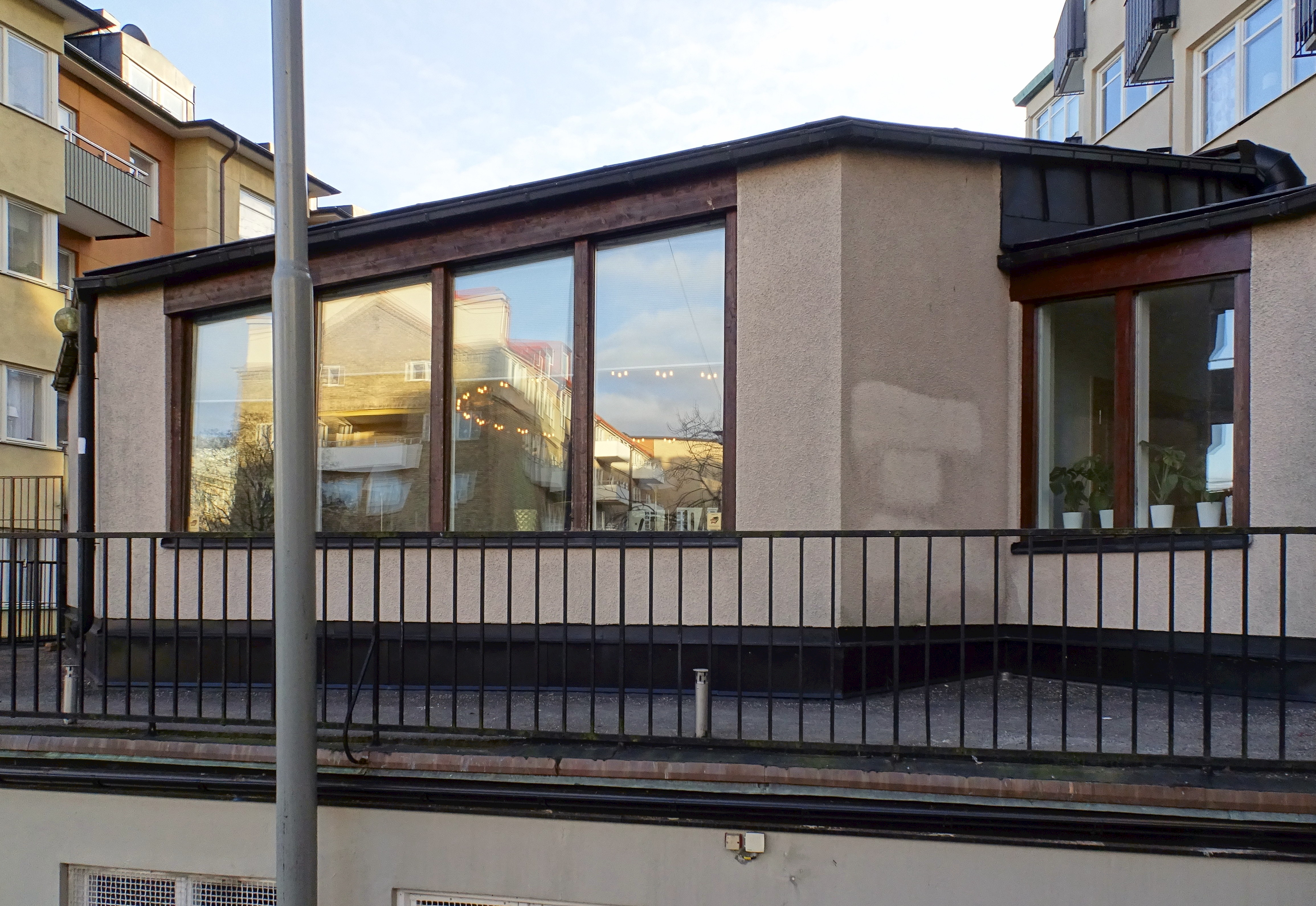 Södermalmskyrkan, kyrksalen vid Gotlandsgatan